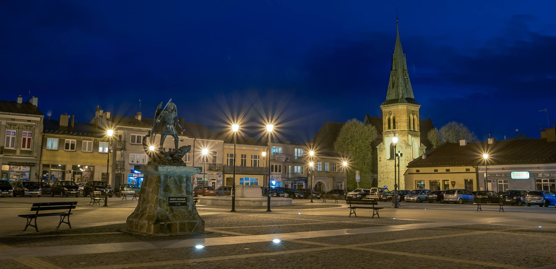 Rynek w Strzyżowie po modernizacji